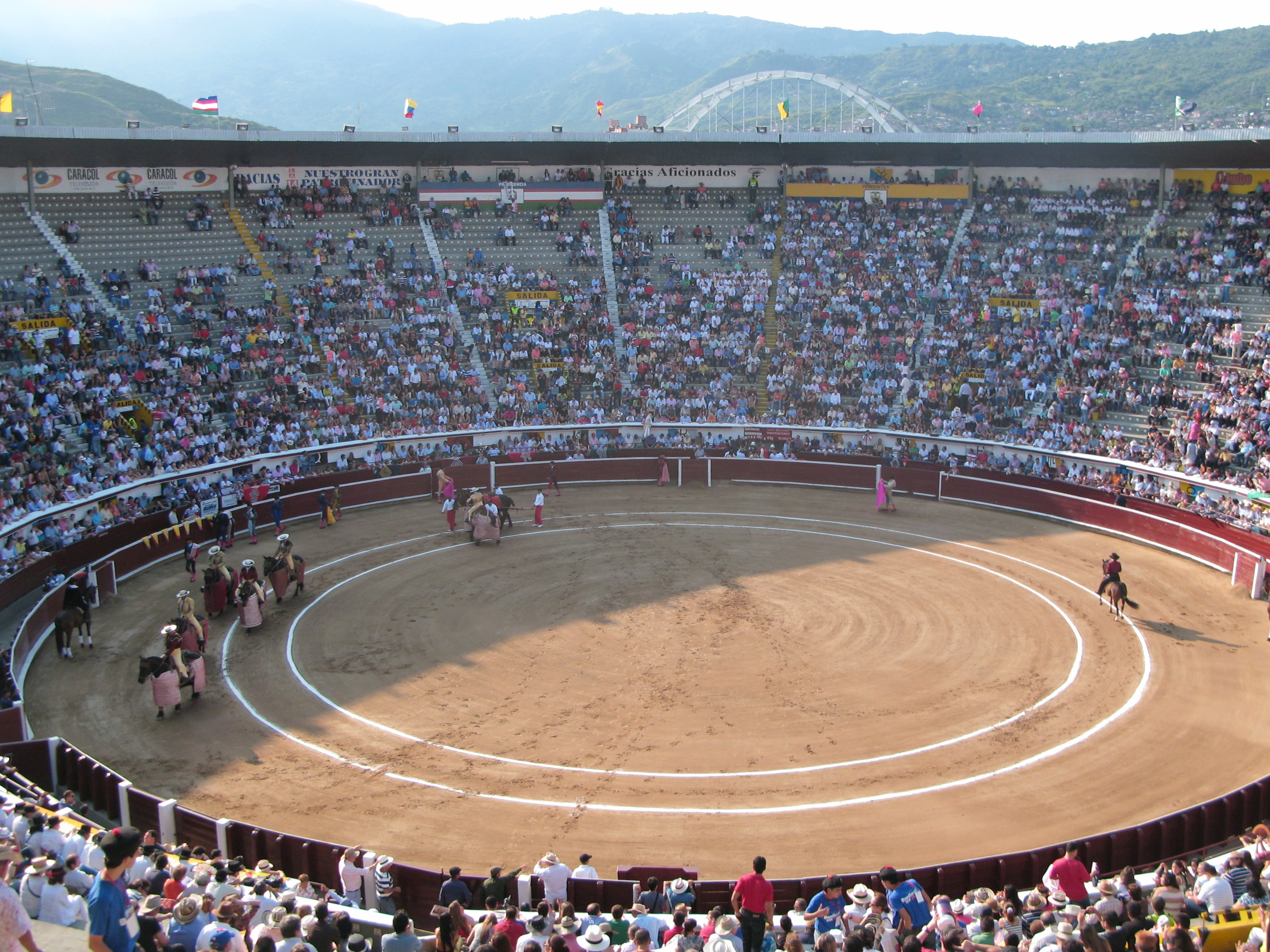 Ramblas Calle de la Feria- Parqueadero Plaza de Toros, Cali Colombia